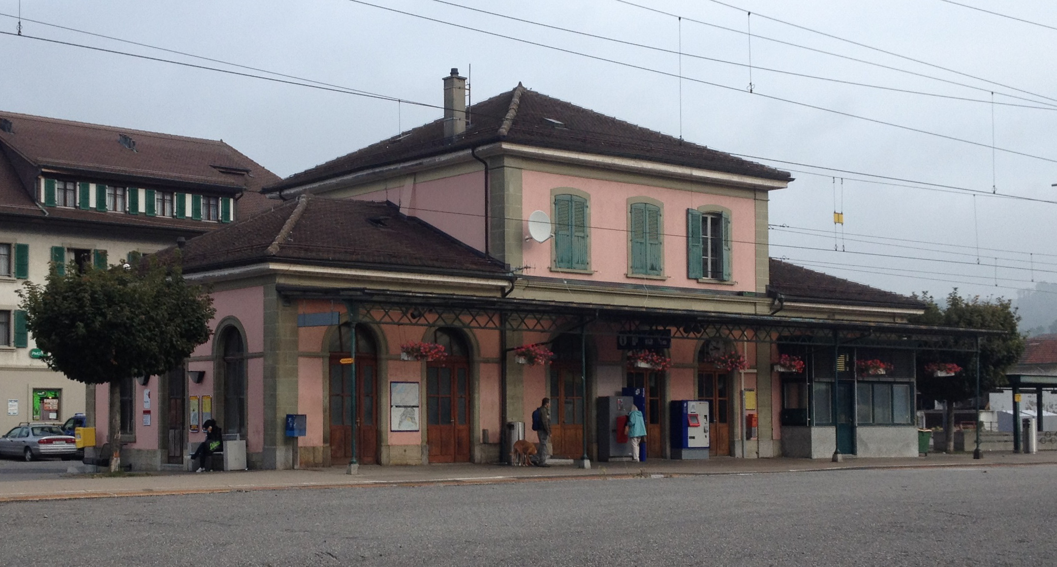 Le bâtiment de la gare ferroviaire de Moudon, en Suisse.